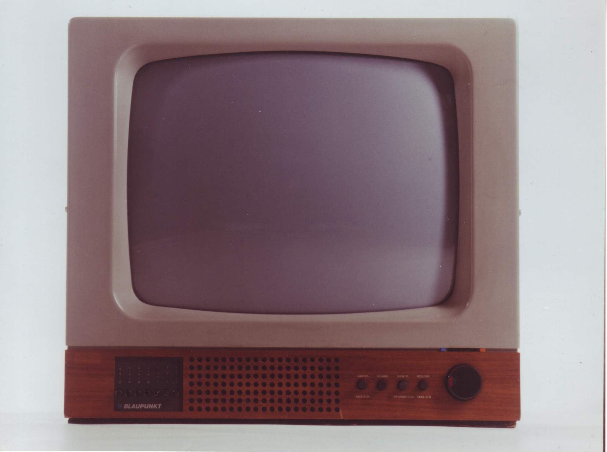 Erster deutscher Farbfernseher. Hersteller: Bosch-Blaupunkt. Design: Arno Votteler 1969.